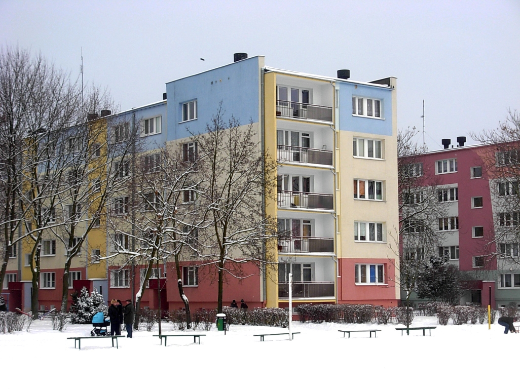 Zabudowa na osiedlu Kapuściska w Bydgoszczy